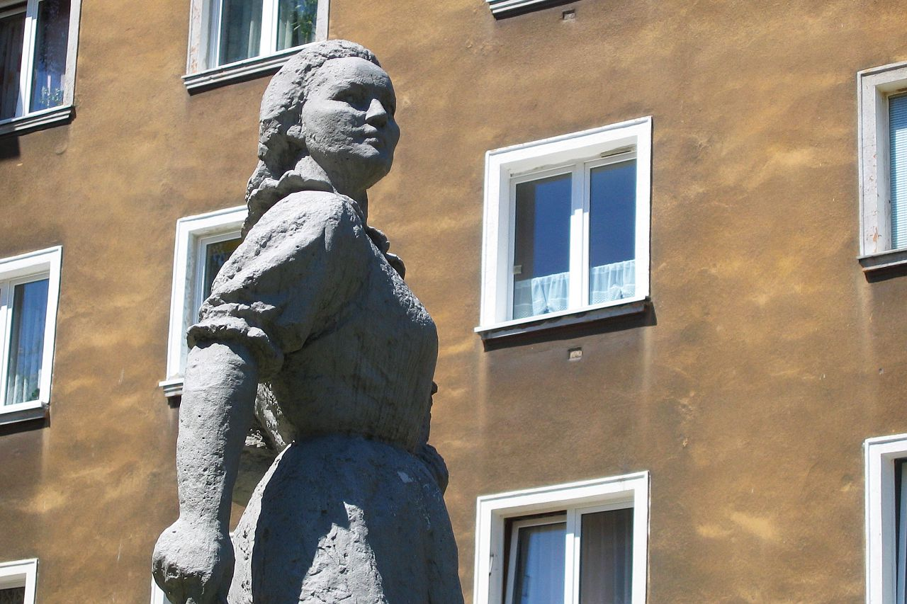 Rzeźba robotnicy z kielnią na osiedlu "A". Tychy, Województwo Śląskie.